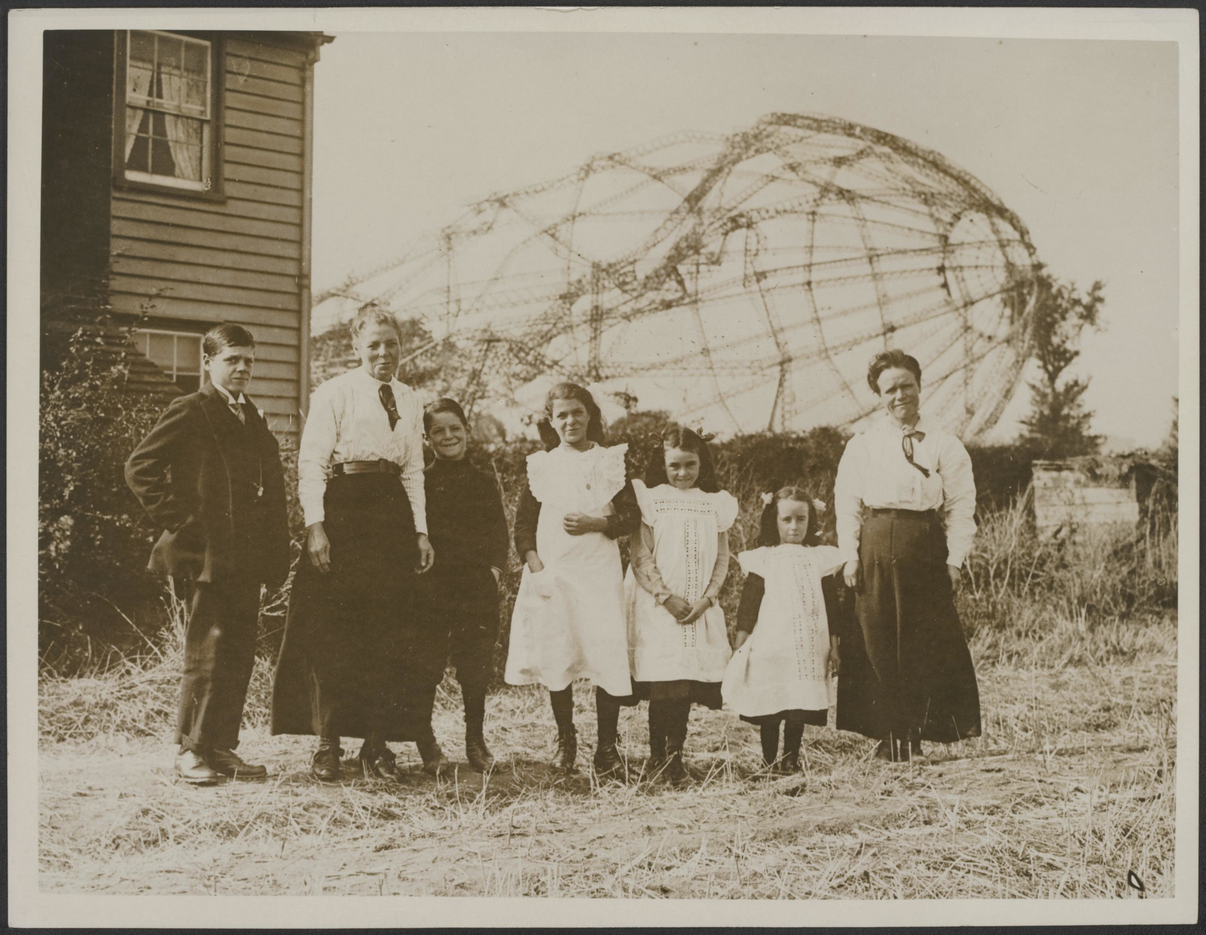 Collectie / Archief : Fotocollectie Eerste Wereldoorlog Reportage / Serie : Photograph of the 2nd Zeppelin brought down 24/9/1916 Beschrijving : Mrs. Lewis and family photographed with the wreckage of the Zeppelin for a background Annotatie : Foto van Zeppelin neergehaald op 24 september 1916. Mevrouw Lewis en familie gefotografeerd met het wrak van de Zeppelin als achtergrond Datum : 24 september 1916 Locatie : Groot-Brittannië Trefwoorden : eerste wereldoorlog, foto's, wrakstukken, zeppelins Persoonsnaam : Lewis Fotograaf : Central News Auteursrechthebbende : Public Domain logo Materiaalsoort : Foto (zwart/wit) Nummer archiefinventaris : bekijk toegang 2.24.09 Bestanddeelnummer : 158-2596